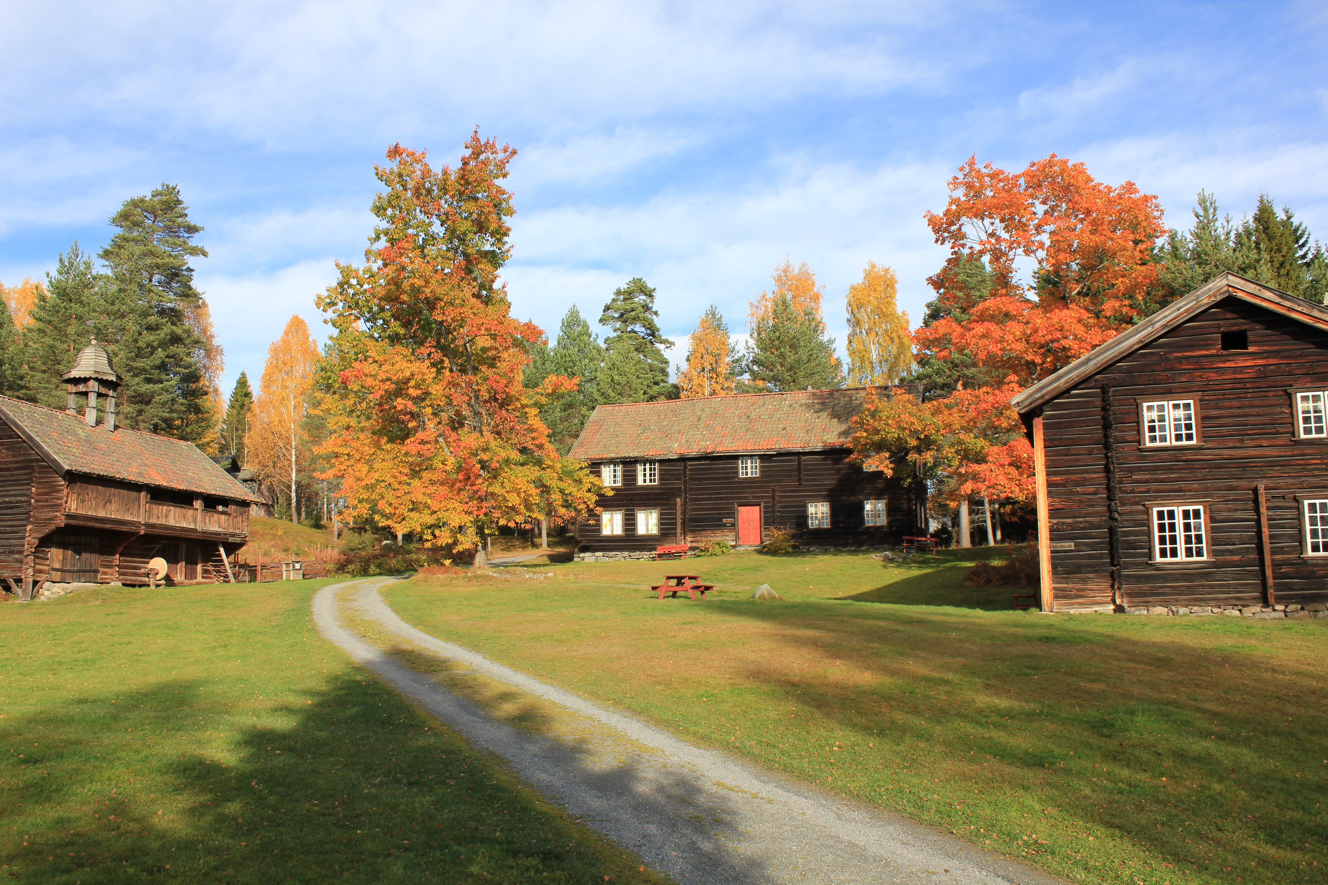 Tun ved Eiktunet friluftsmuseum.